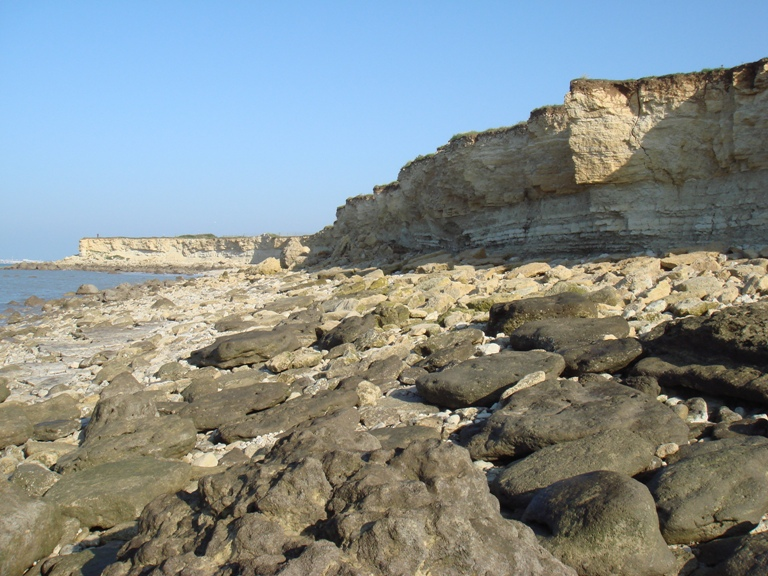 La Pointe du Chay, near La Rochelle, Charente-Maritime, Poitou-Charentes, France, Europe.